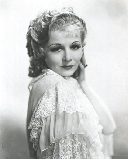 Sharon Lynn, foto pubblicitaria